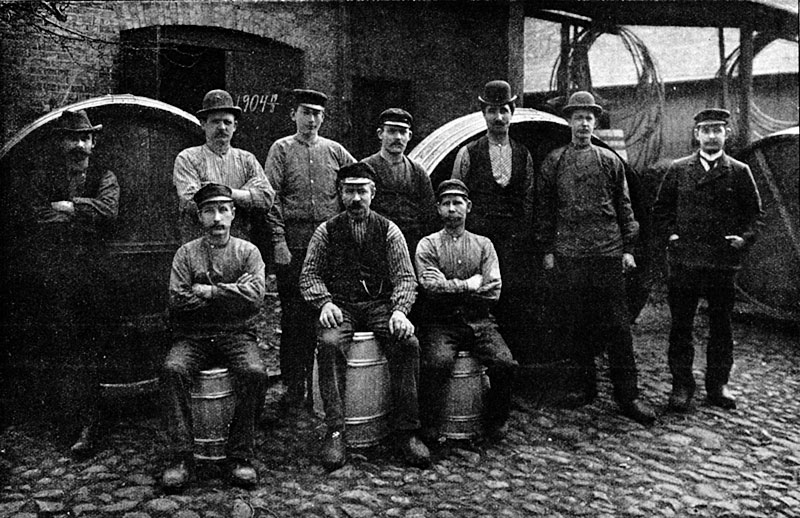 Coopers, F Stillmans tunnbinderi, Malmö, Sweden